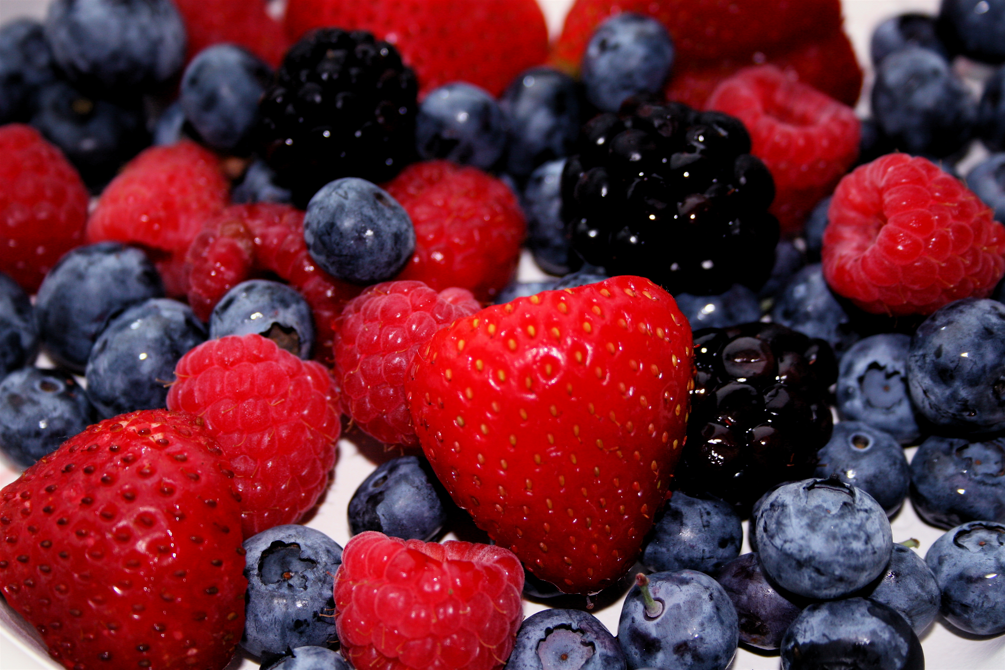 Summer berries.